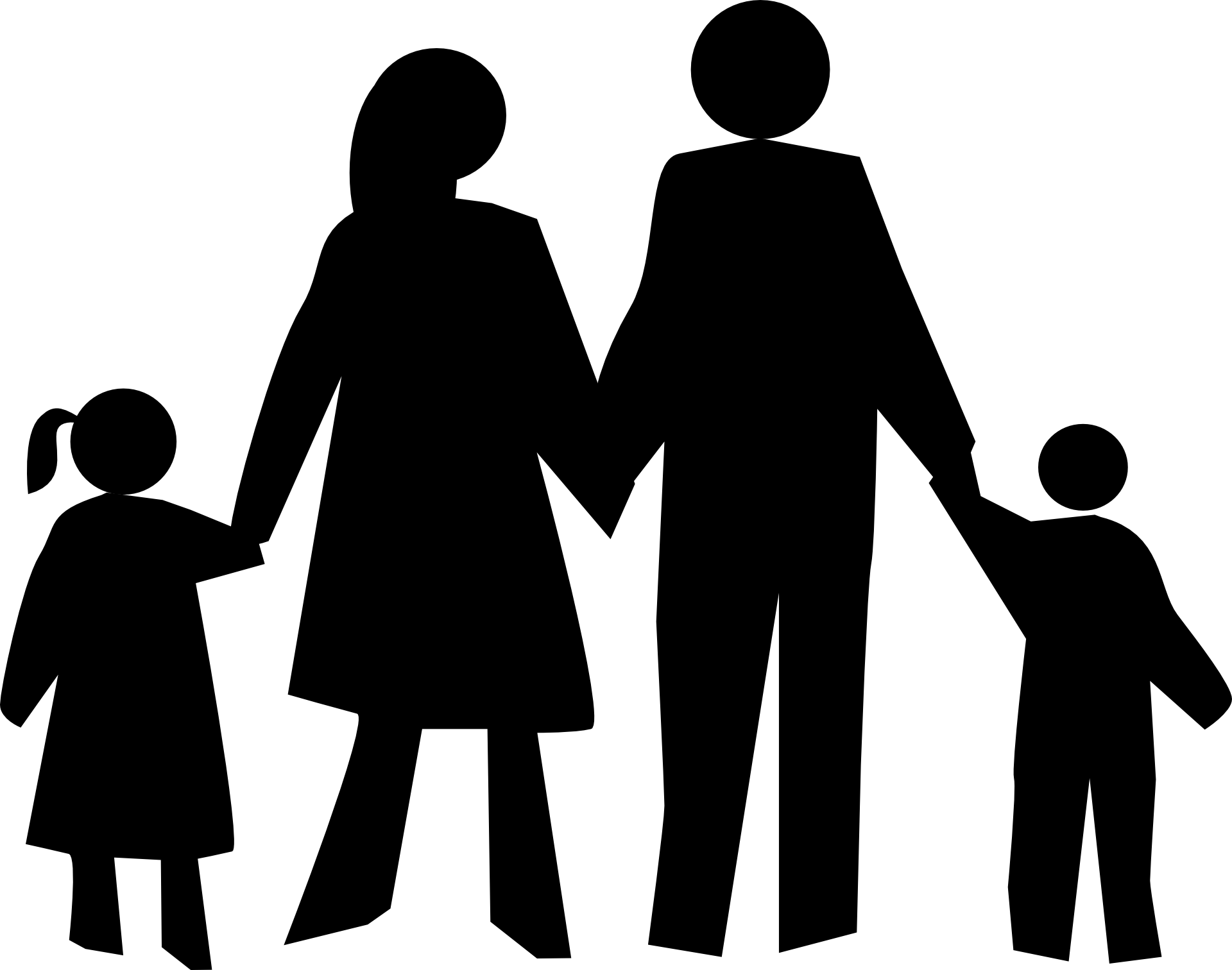 L'aide des parents